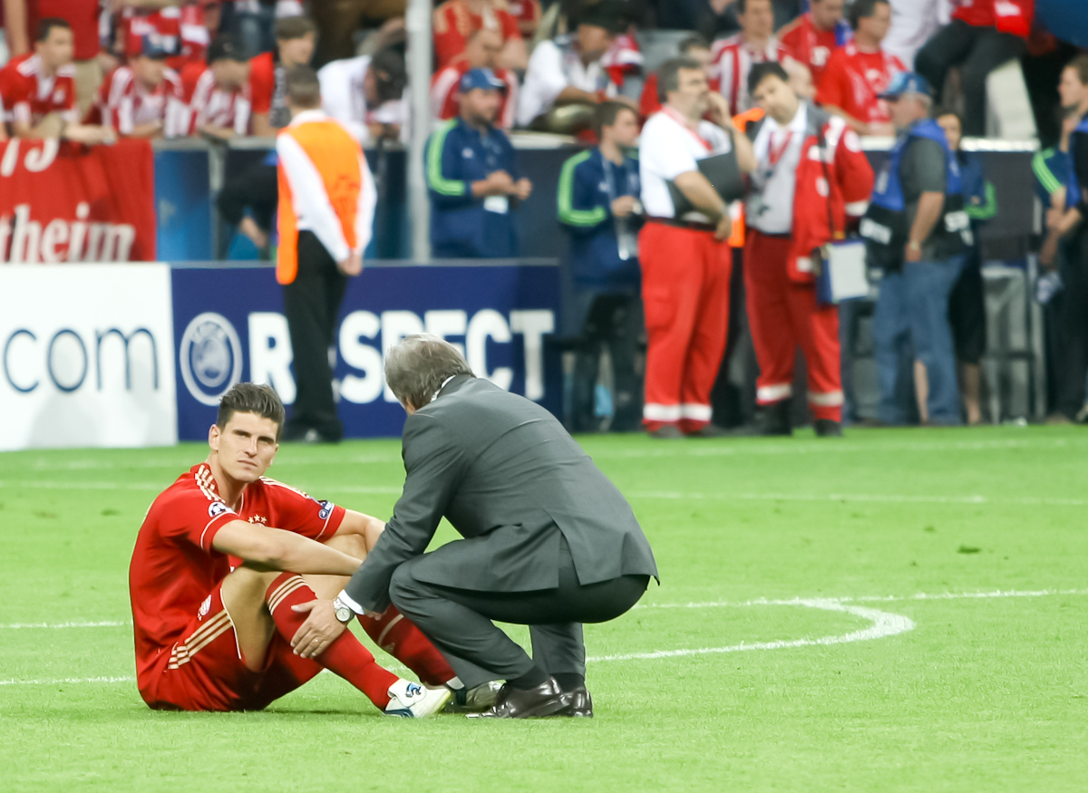 RA1_6562